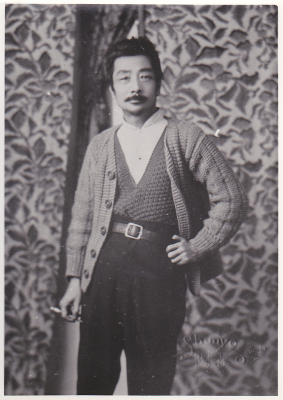 1933年5月1日，鲁迅穿着许广平编织的毛衣，摄于上海春阳照相馆。